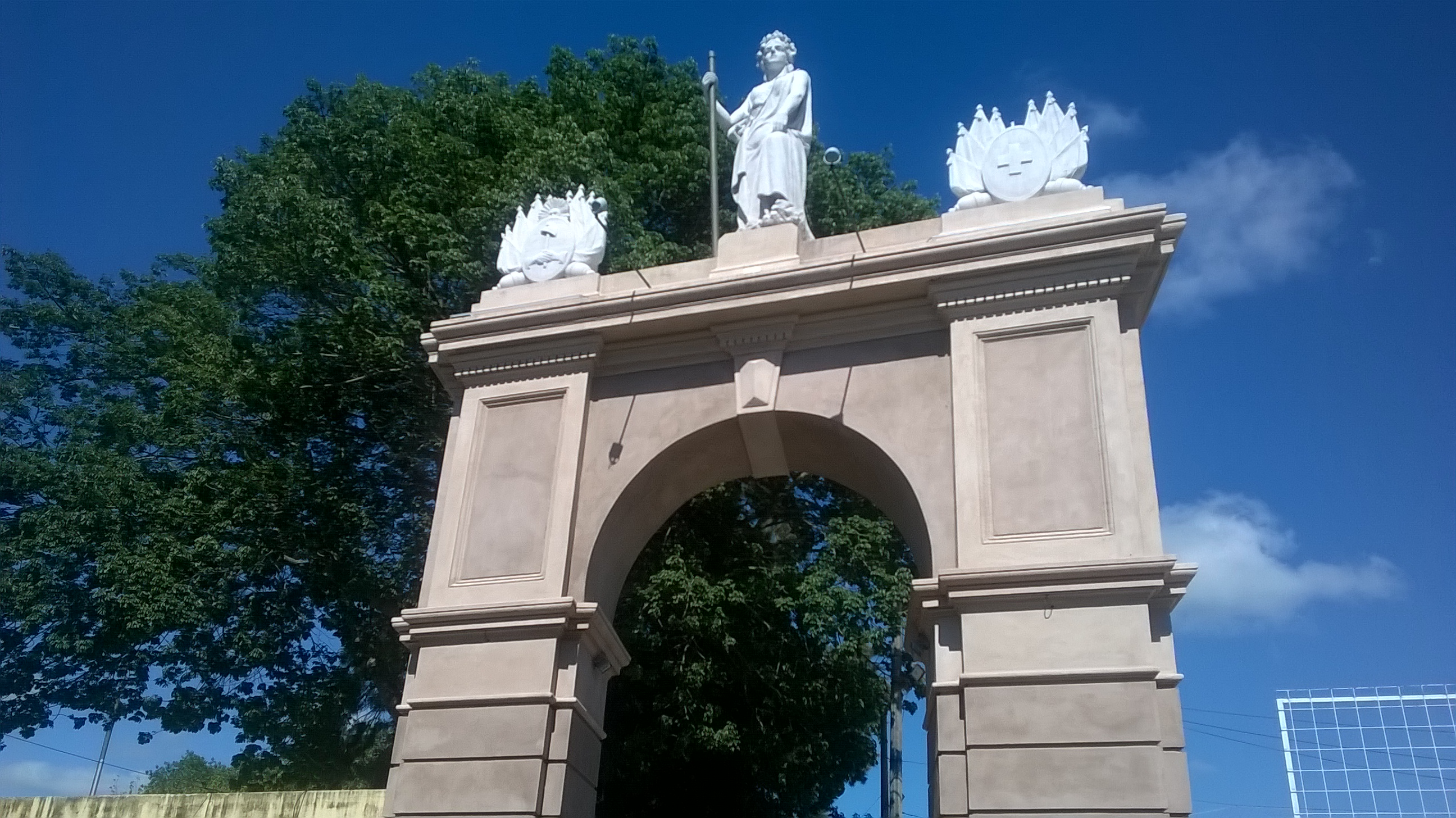 Imagen actual del Arco del Triunfo en el ingreso al club Sociedad Tiro Suizo